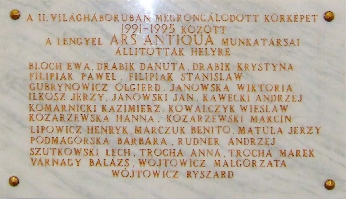 A Feszty-körkép restaurátorainak emléktáblája az ópusztaszeri rotundában